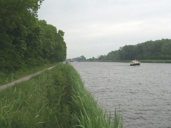 zelf gemaak op 2/6/2005 (я!k)